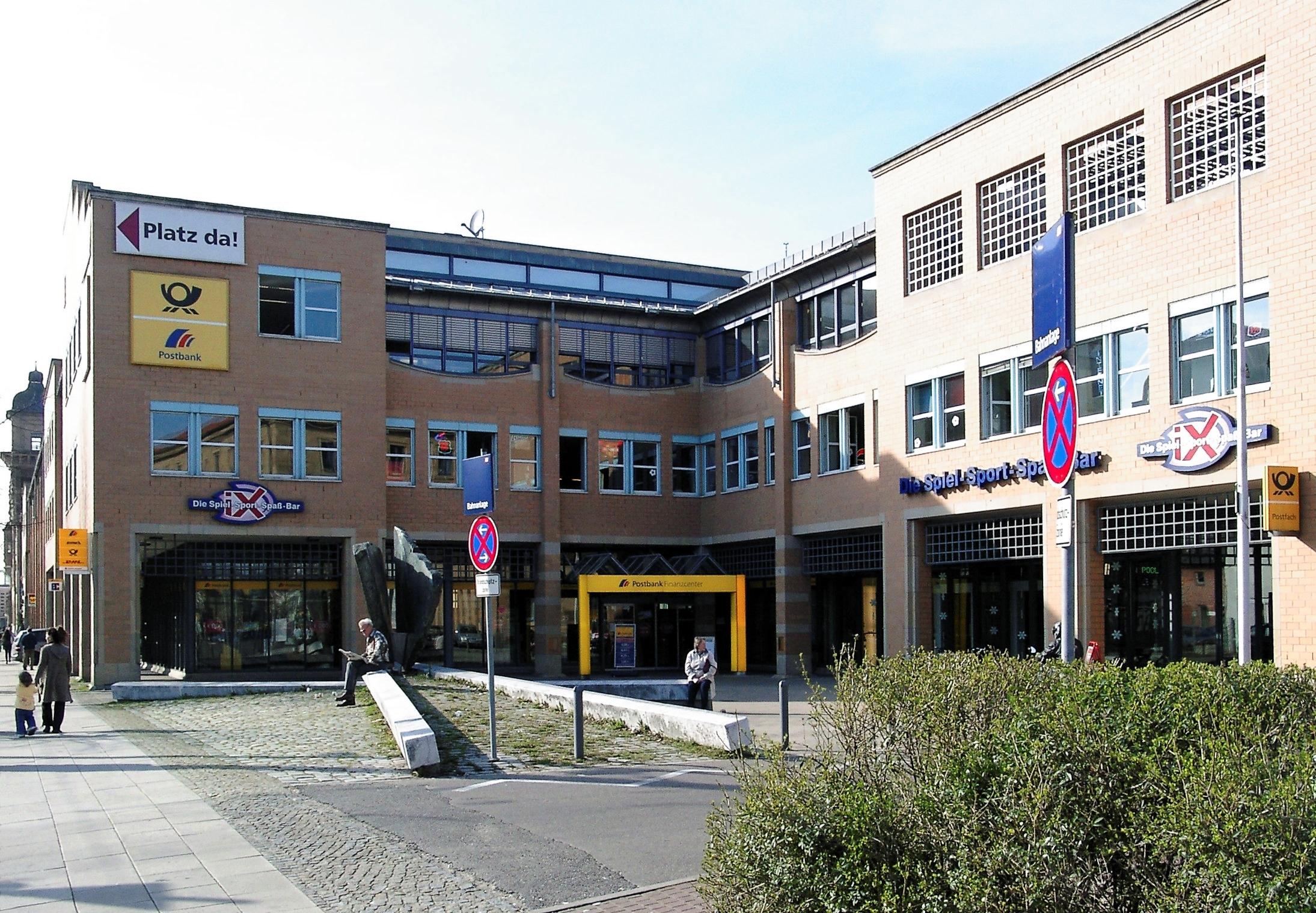 Heilbronn, Neue Hauptpost in der Bahnhofstraße 12, Nähe Hauptbahnhof